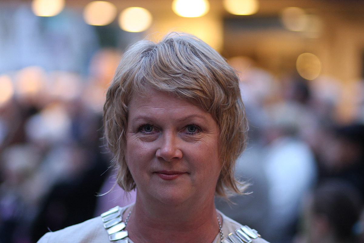 Norunn Østråt Koksvik, ordfører i Sandnes